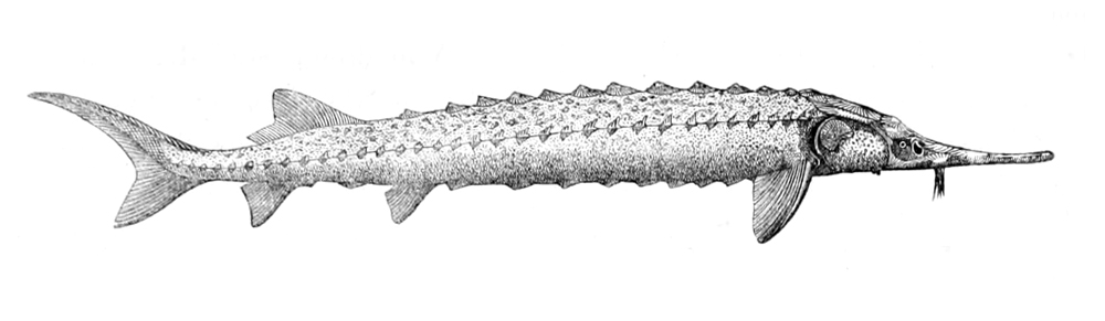 Acipenser stellatus